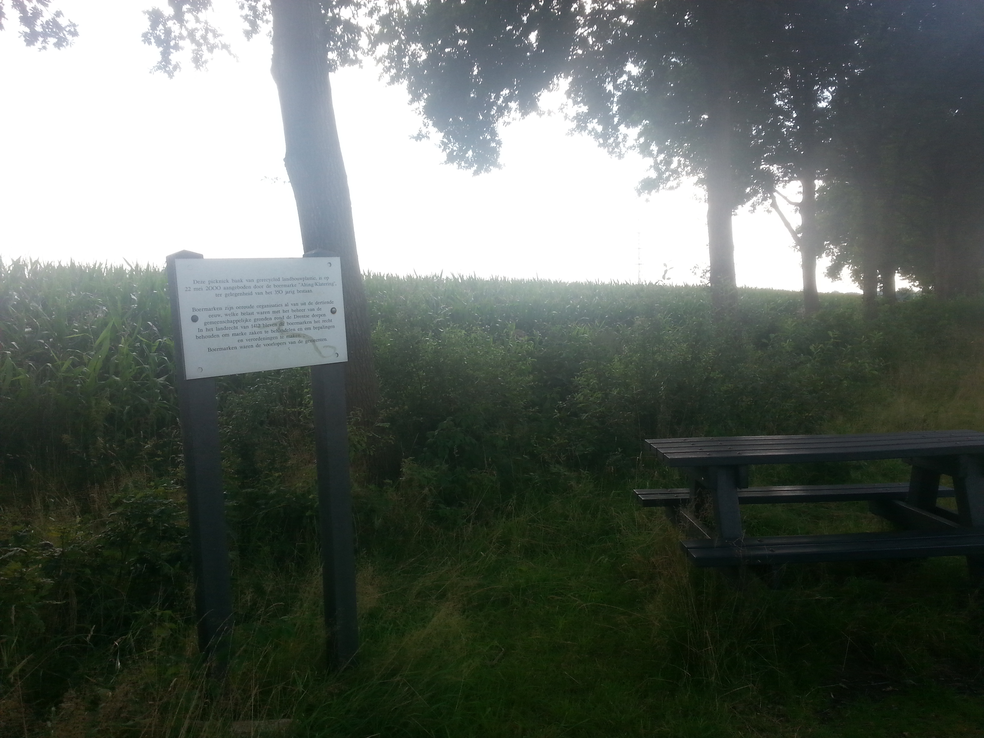 Tijdens fietstocht.